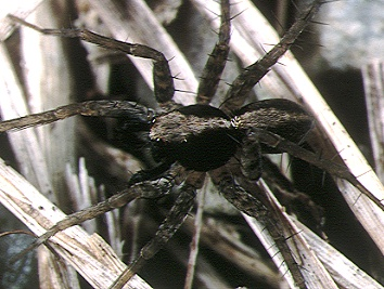 female Pardosa laevitarsis from Okinawa.